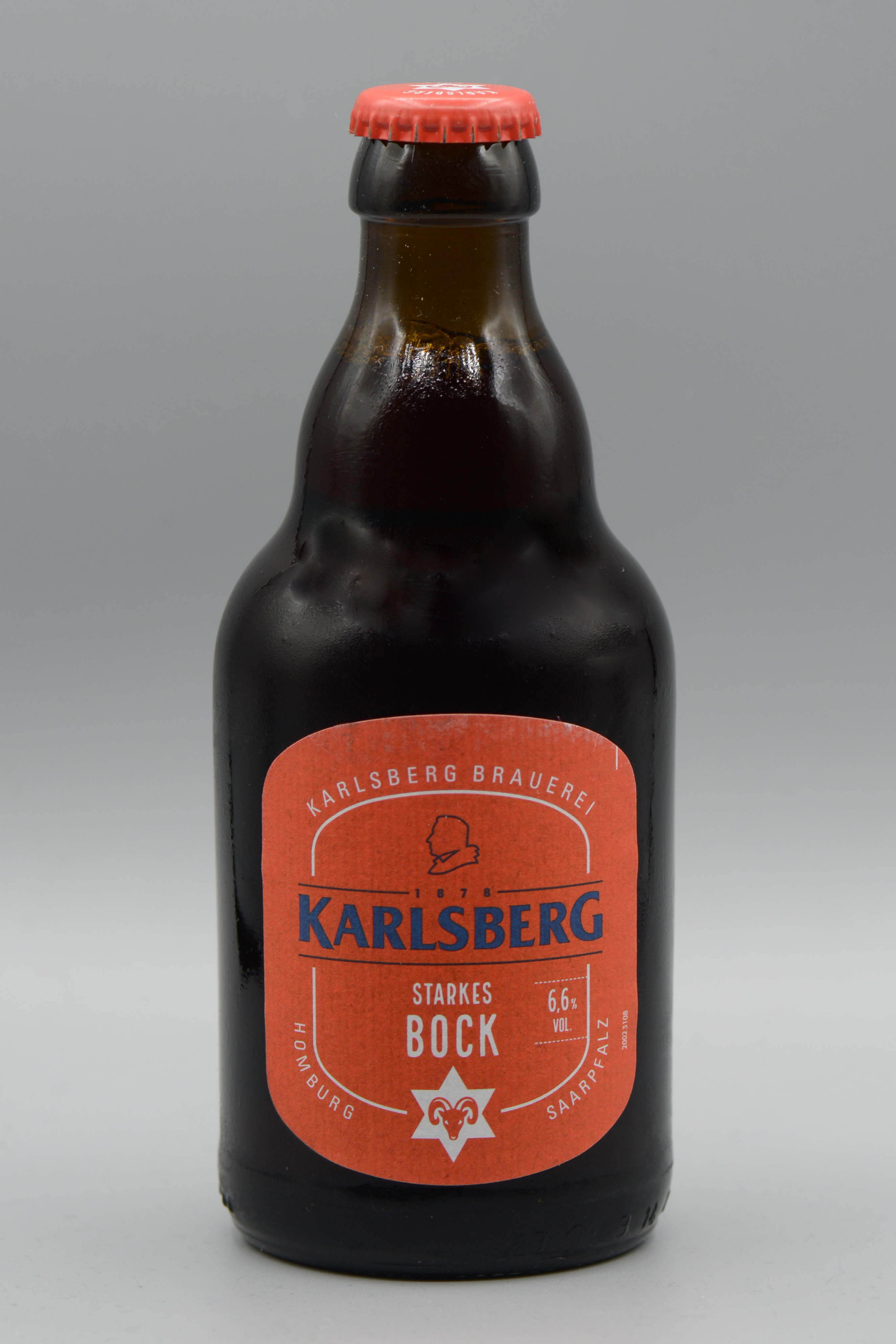 Bockbier in der Stubbi-Flasche der Karlsberg Brauerei in Homburg, Saarland/ Deutschland (2018).